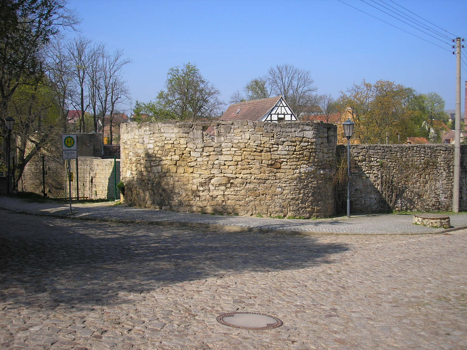 Die Wasserburg in Schkölen (Thüringen).